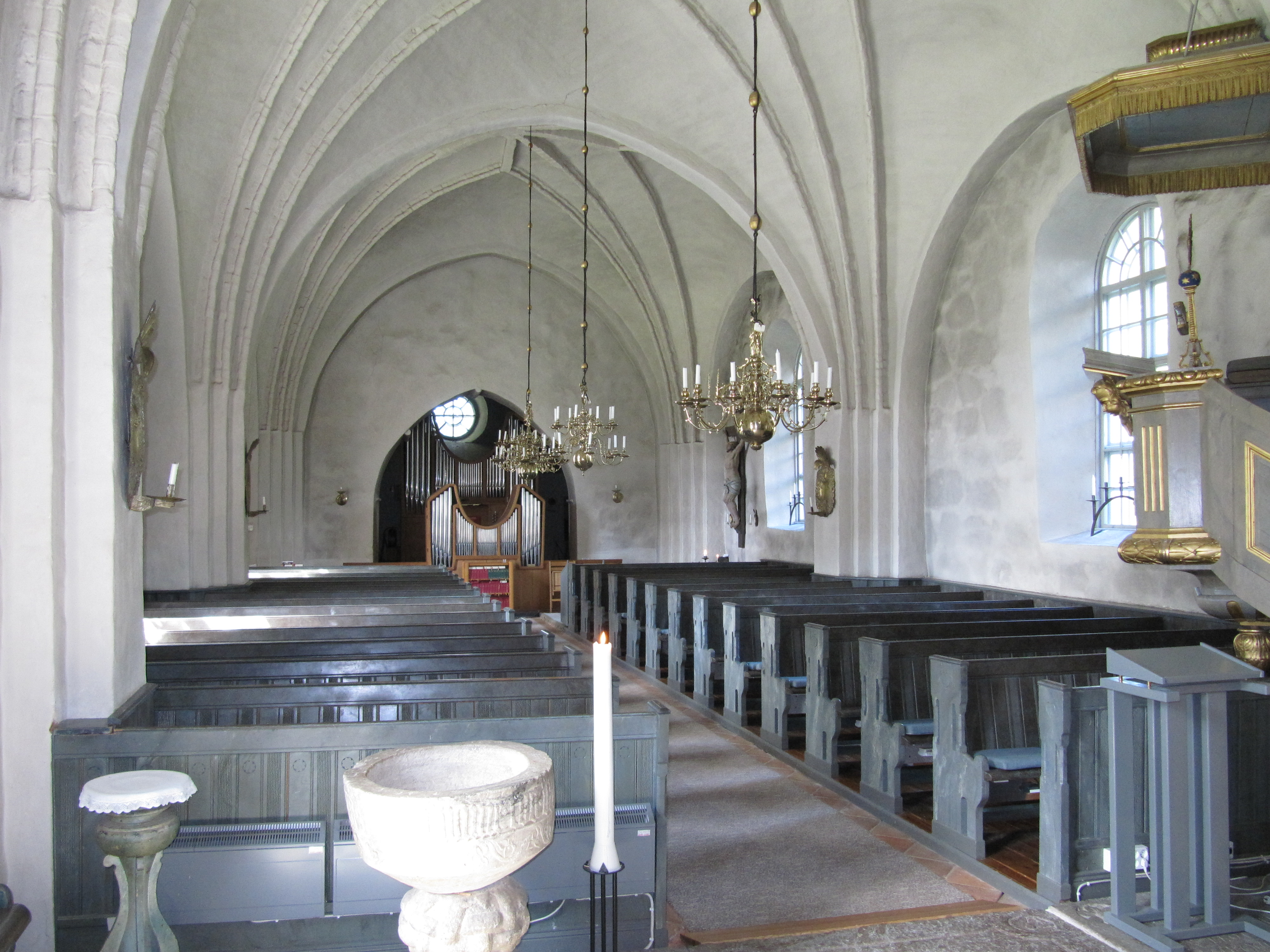 Kyrkorum i Skepptuna kyrka